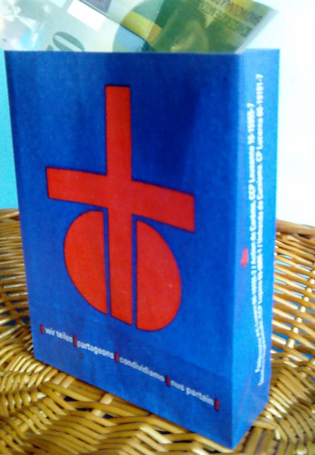 Fastenopfer, Opfer-Säcklein (mit Geldschein) Höhe; 15,7 cm / Länge; 11,9 cm / Breite: 3,6 cm / rotes Fastenopfer-Signet auf viollettem Grund, im unteren Teil ist der 'Zweck' dieser Papiertüte in den Schweizer Landessprachen abgedruckt; wir teilen, partageons, condividiamo, nus partain